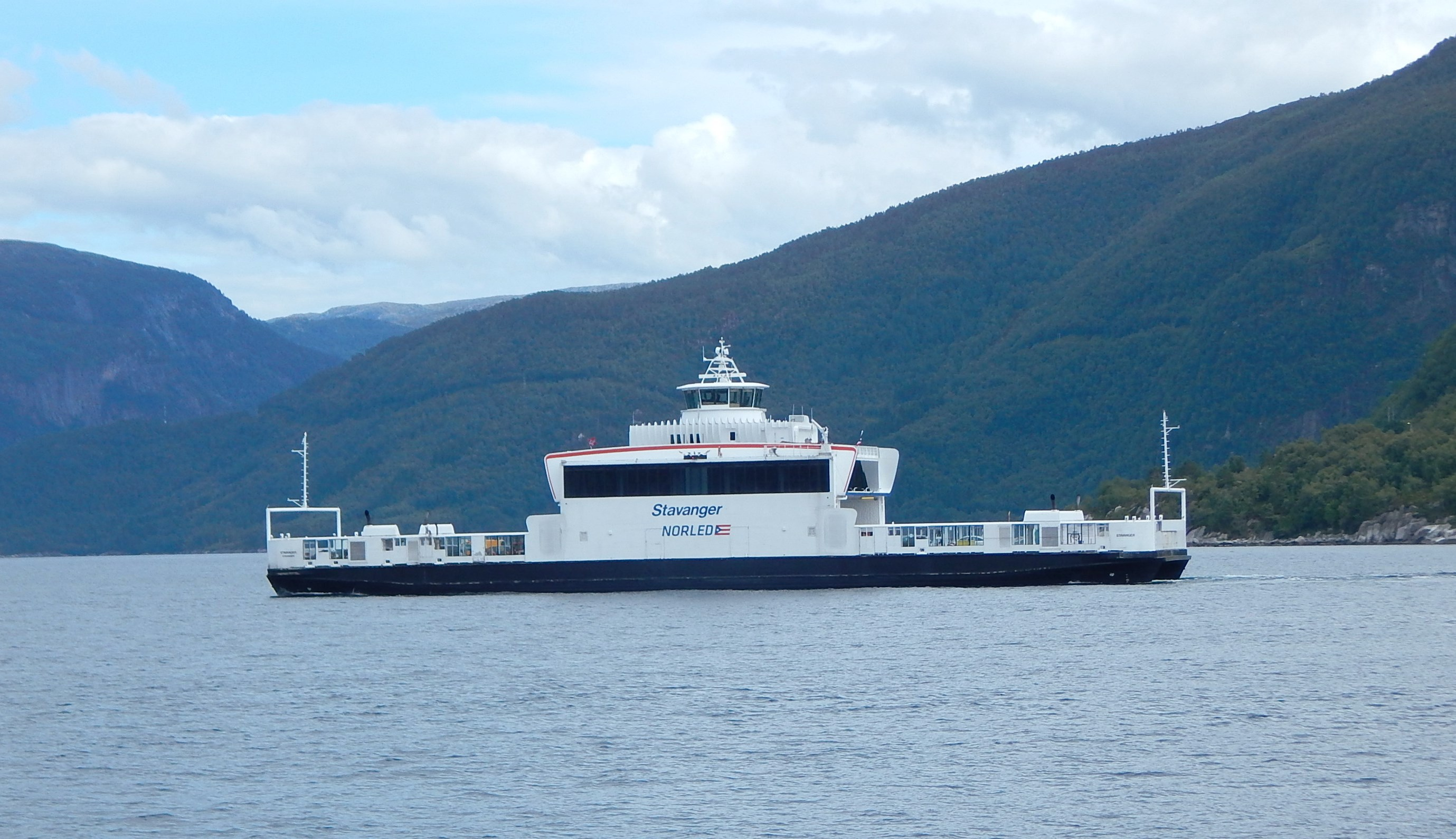 MF Stavanger i trafikk på strekningen Lavik–Oppedal sommeren 2017